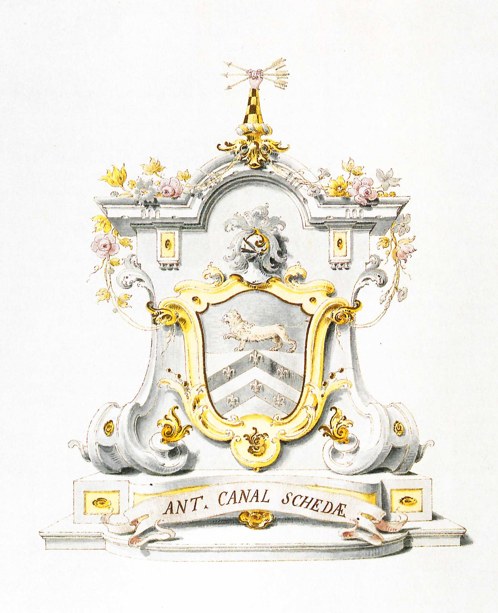 Antonio Visentini Exlibris für Consul Smith